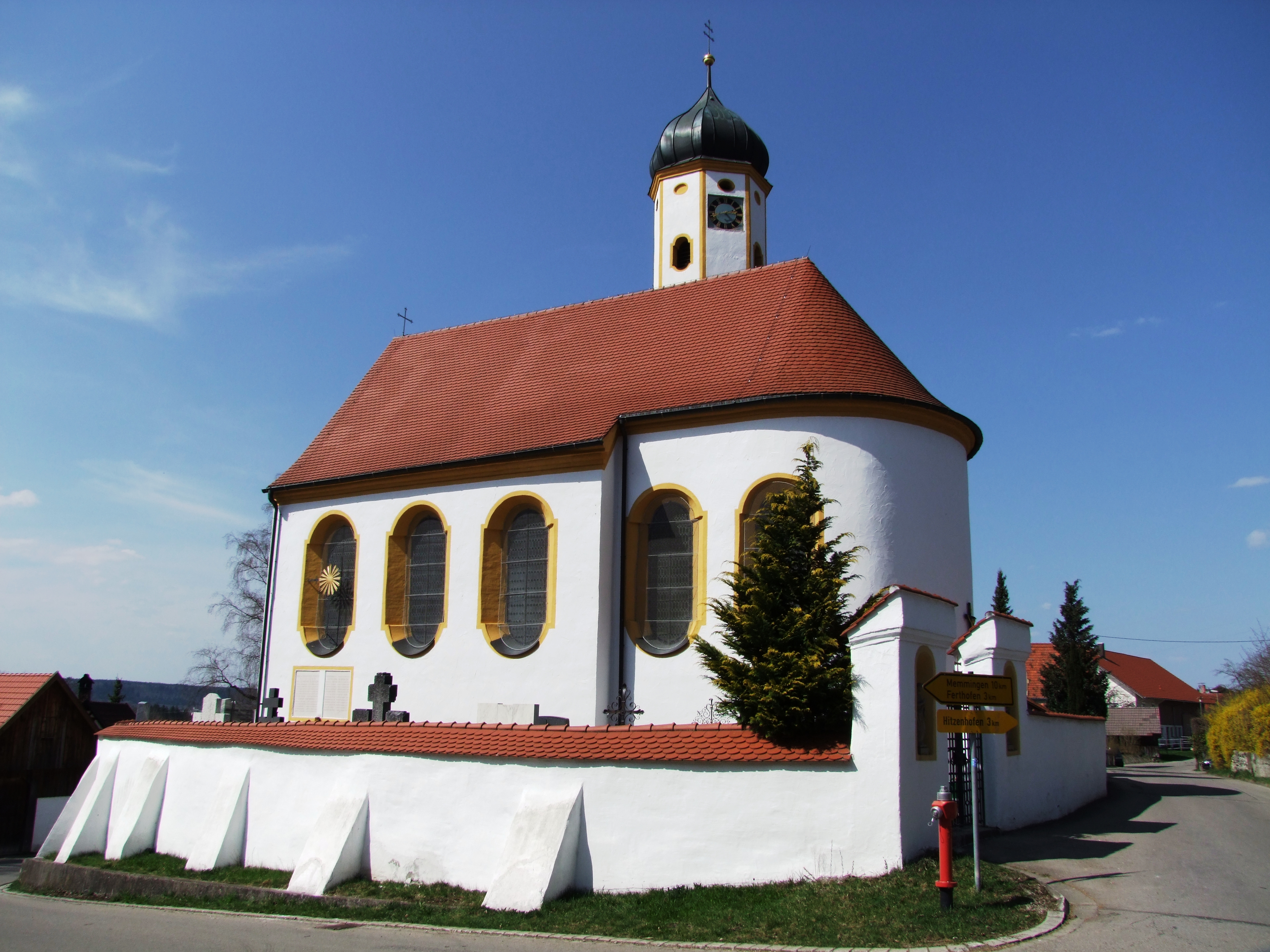 Außenansicht von St. Nikolaus in Kardorf. St. Nikolaus in Kardorf.